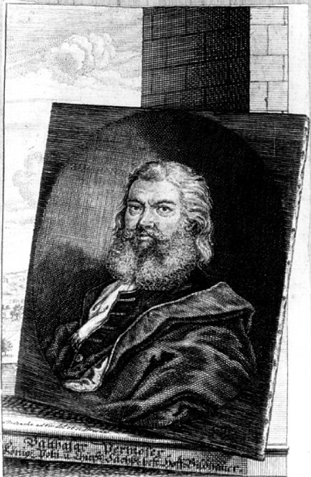 Balthasar Permoser (1651–1732), deutscher Bildhauer